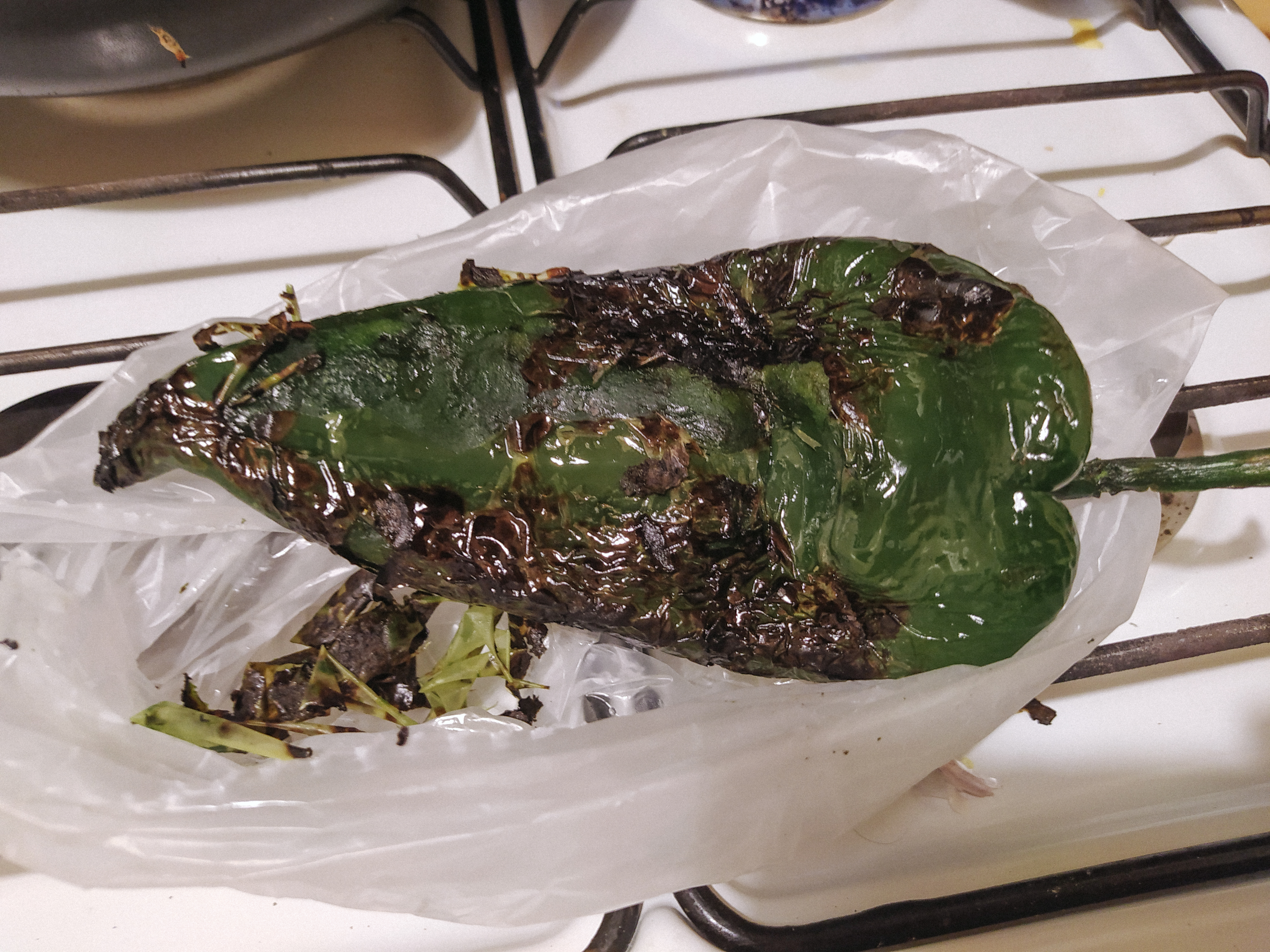 Chile recién tatemado en el fuego. Ahora toca meterlo en la bolsa de plastico para que sude. Hoy hacemos rajas poblanas!